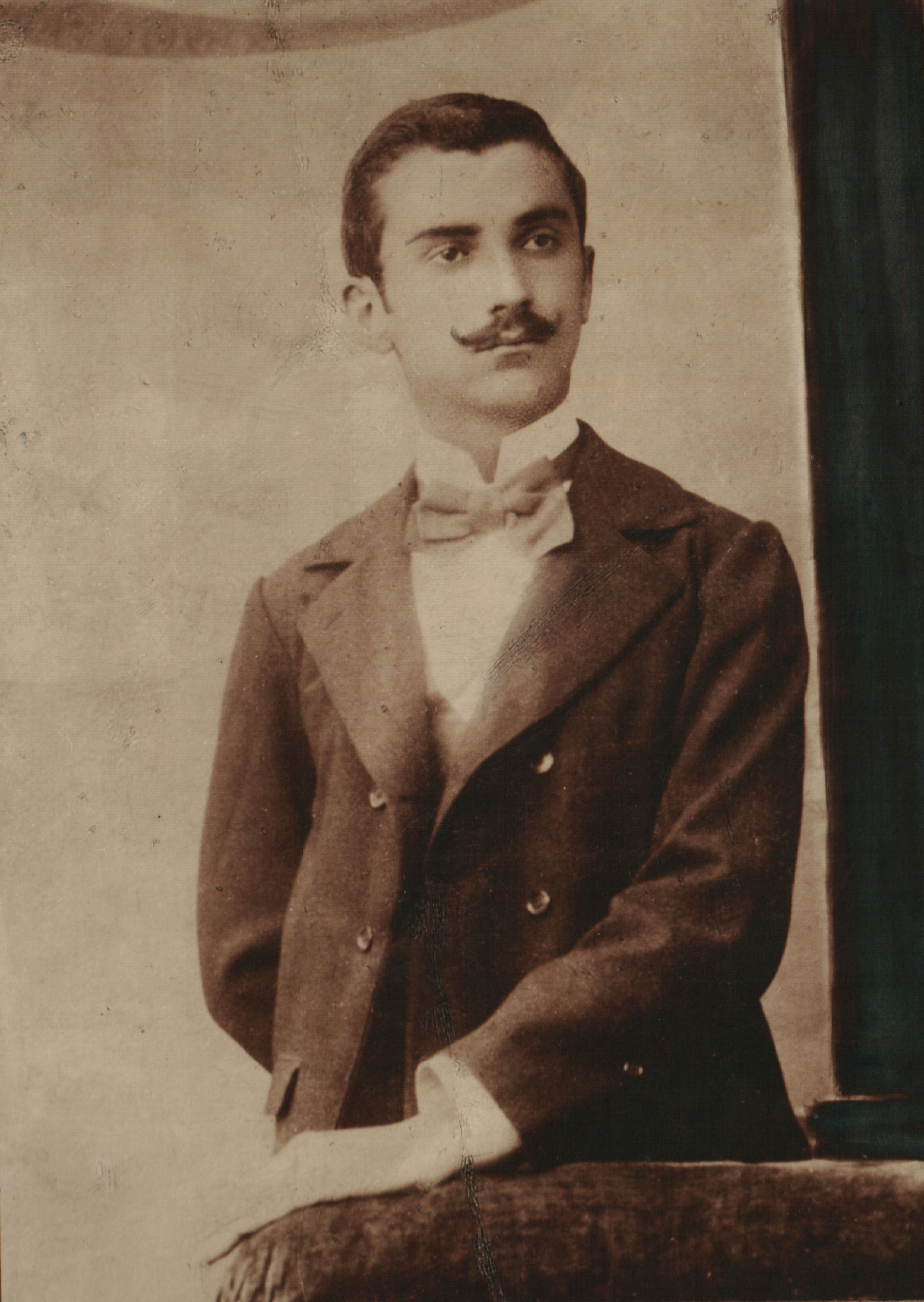 Снимка на Антон Узунов от Охрид.